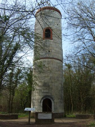 Tour BEAUREGARD